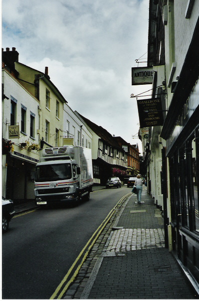 St. Albans, England, gate i sentrum. Foto Cnyborg, juli 2003.